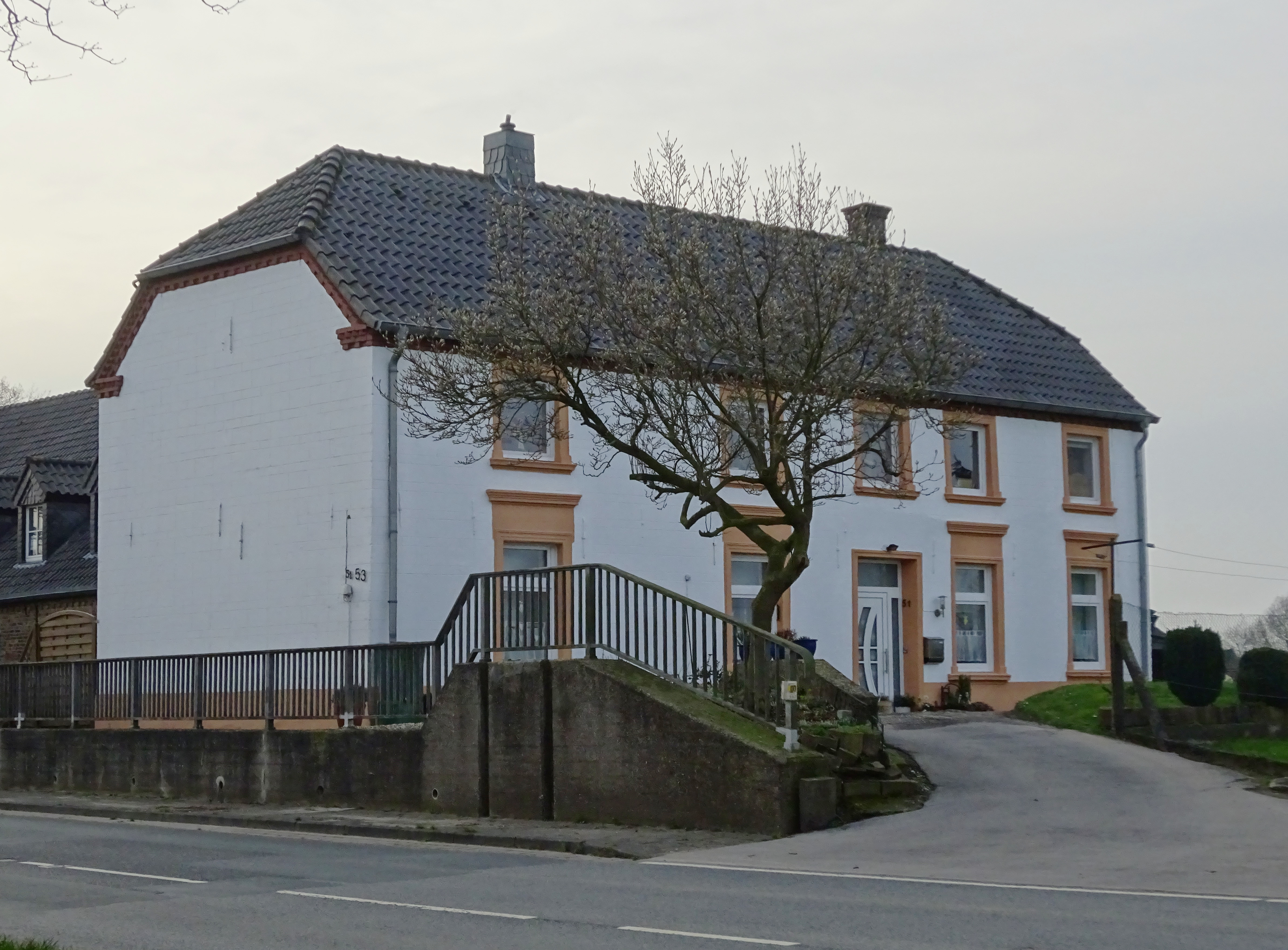 Kalkar-Wissel, Dorfstraße 51-53. Voormalige boerderij aan de Dorfstraße met coupure in de Michelsdick waar de Dorfstraße overgaat in de Rheinuferstraße.richting Grieth